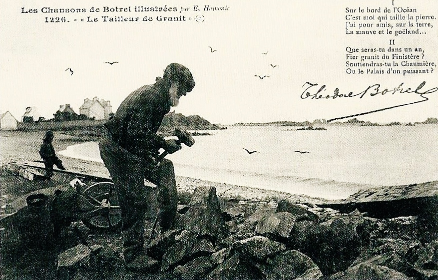 Tailleur de granite sur les bords de l'Aven (carte postale illustrant une chanson de Théodore Botrel).